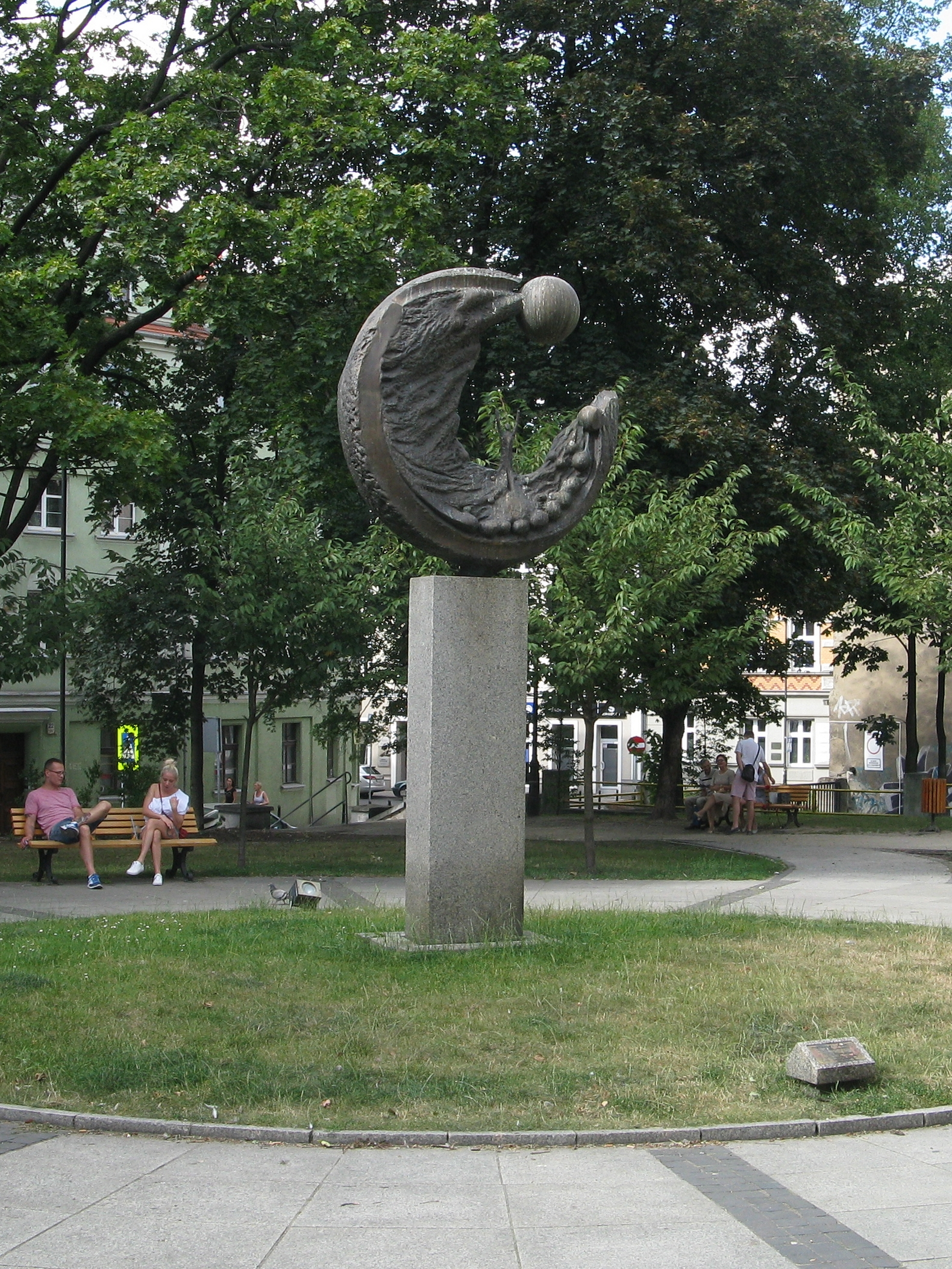 Rzeźba Ku słońcu, autor: prof. Krzysztof Nitsch, miejsce: Plac Rzeźniczy w Gliwicach.